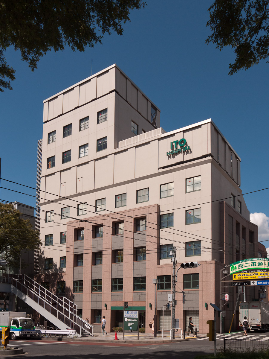 伊藤病院、東京都渋谷区神宮前。